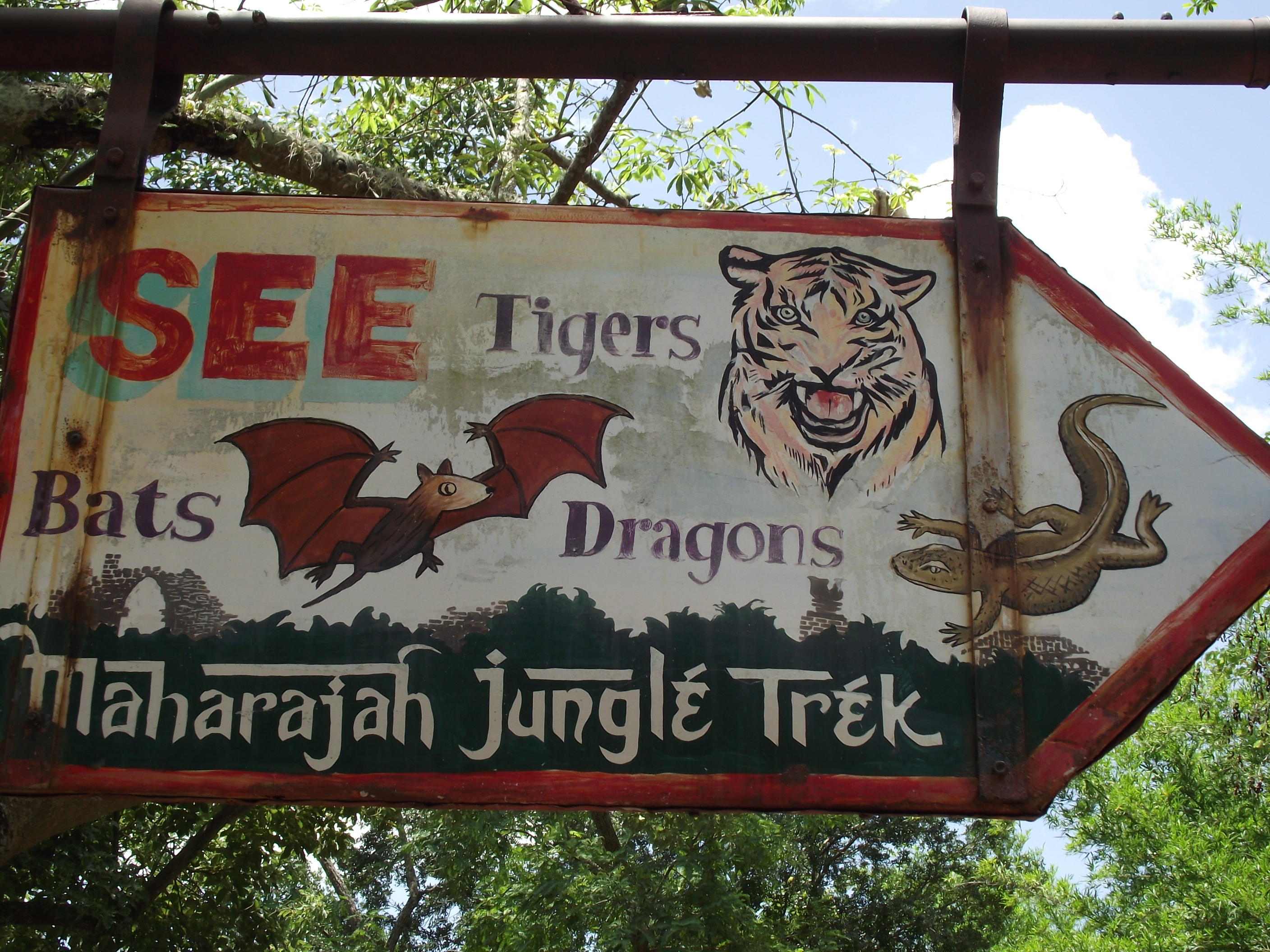 Panneau Maharajah Jungle Trek